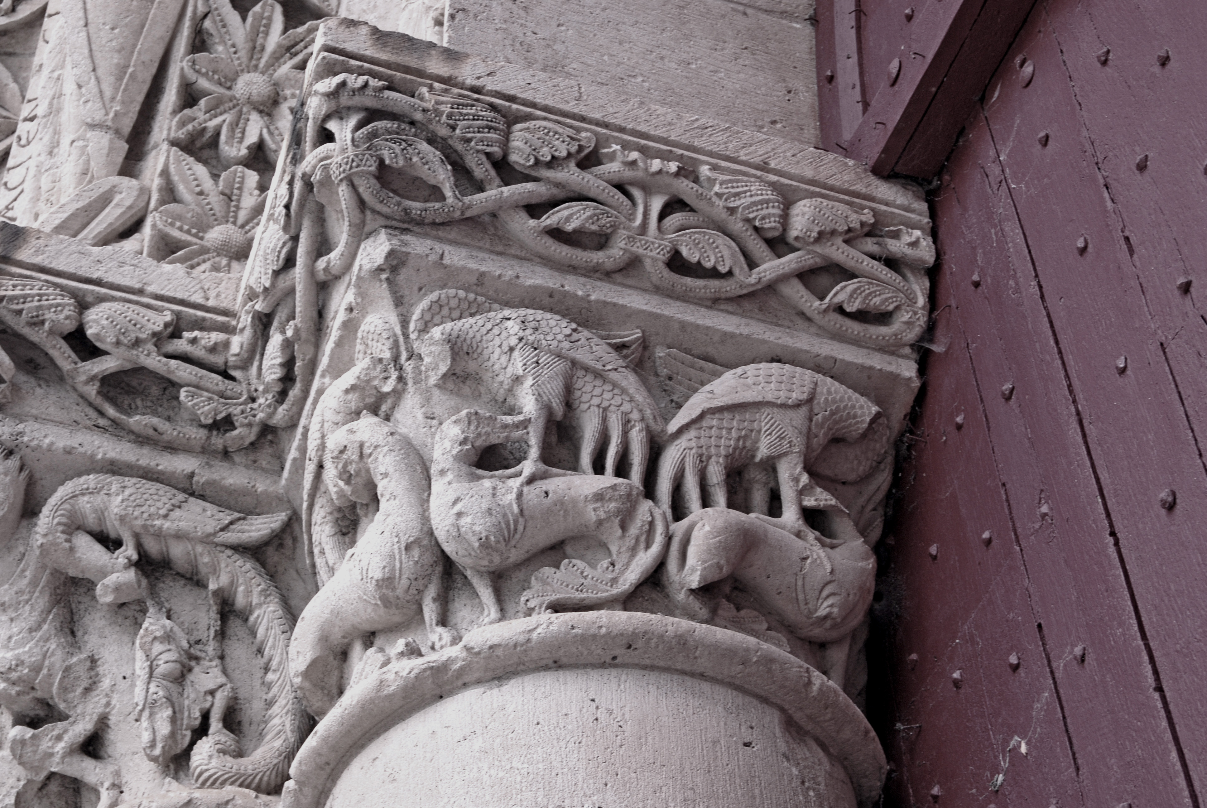 St.-Pierre Aulnay, Hauptportal, Kapitelle links vom Hauptportal